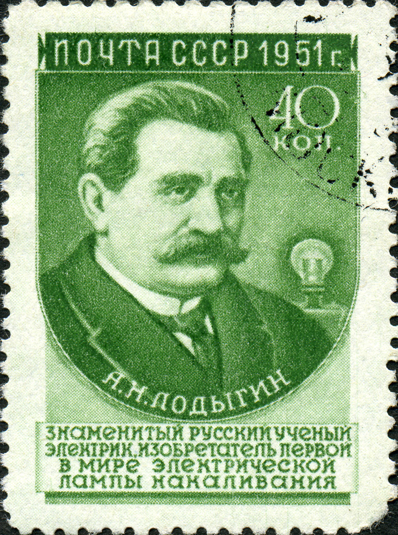 Марка СССР